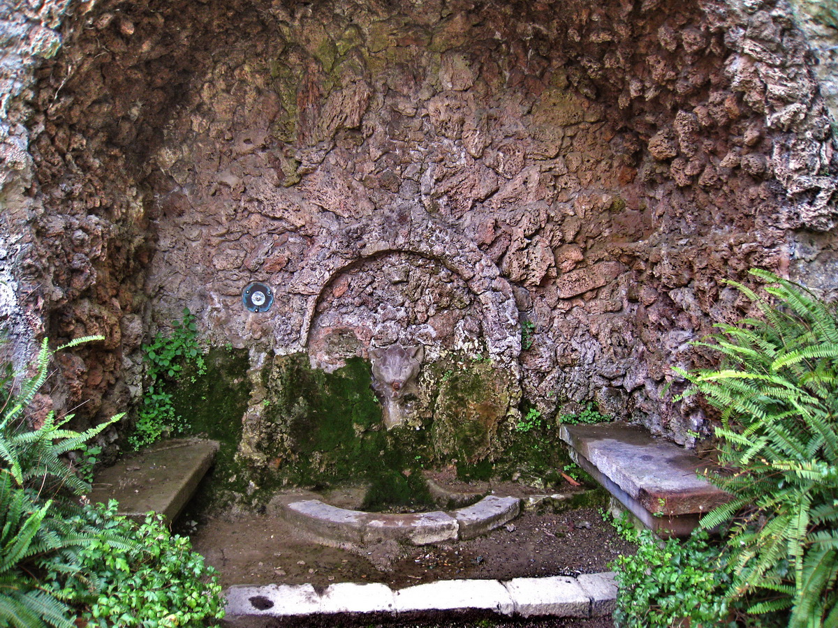 Font del Gat dins dels jardins del mateix nom al parc de Montjuïc (Barcelona, Catalunya). Just davant hi ha un edifici noucentista que, junt amb la urbanització del jardins i la portada de la imatge són obra de Josep Puig i Cadafalch (1918).